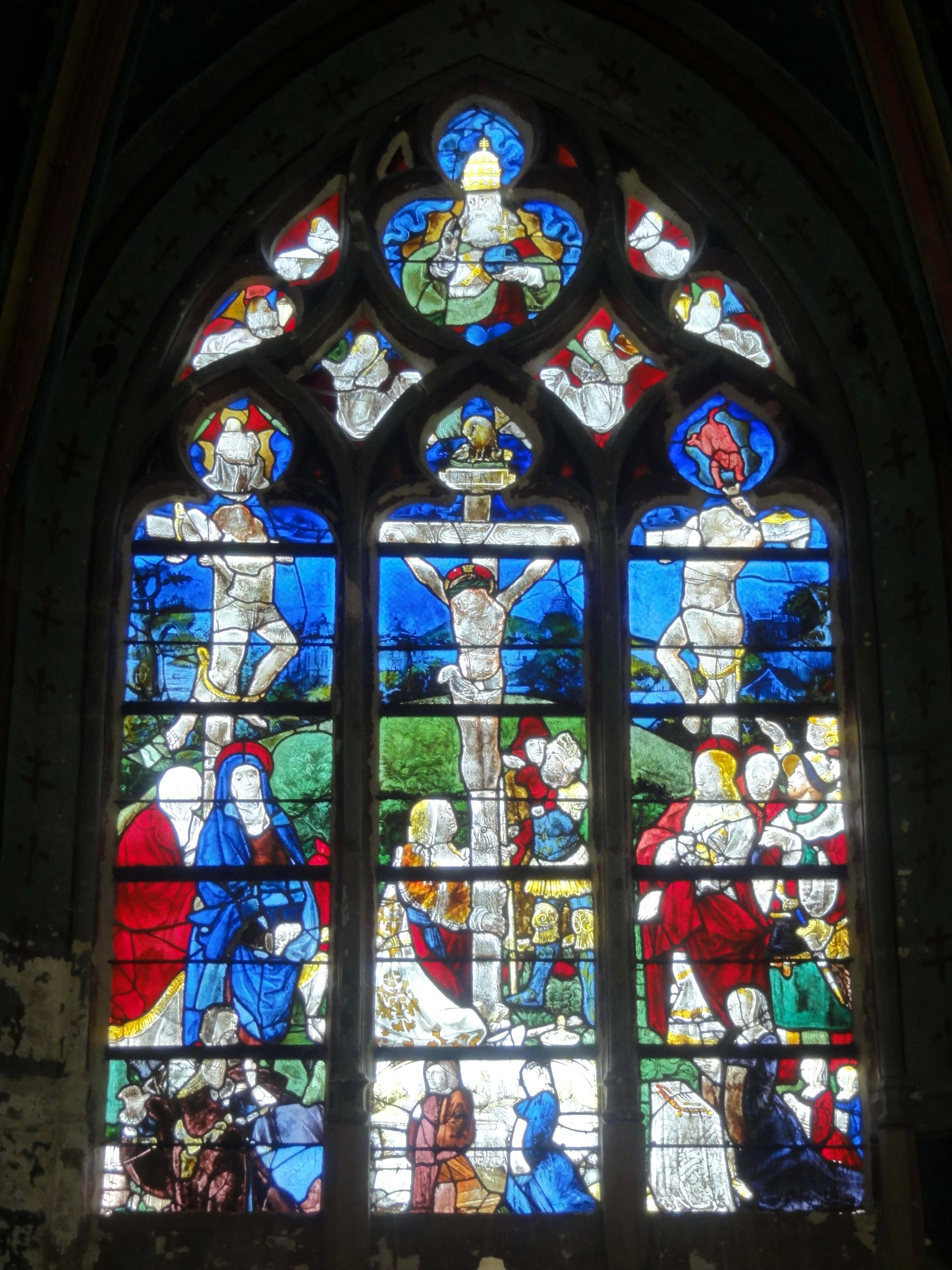 Verrière n° 0 - Crucifixion.